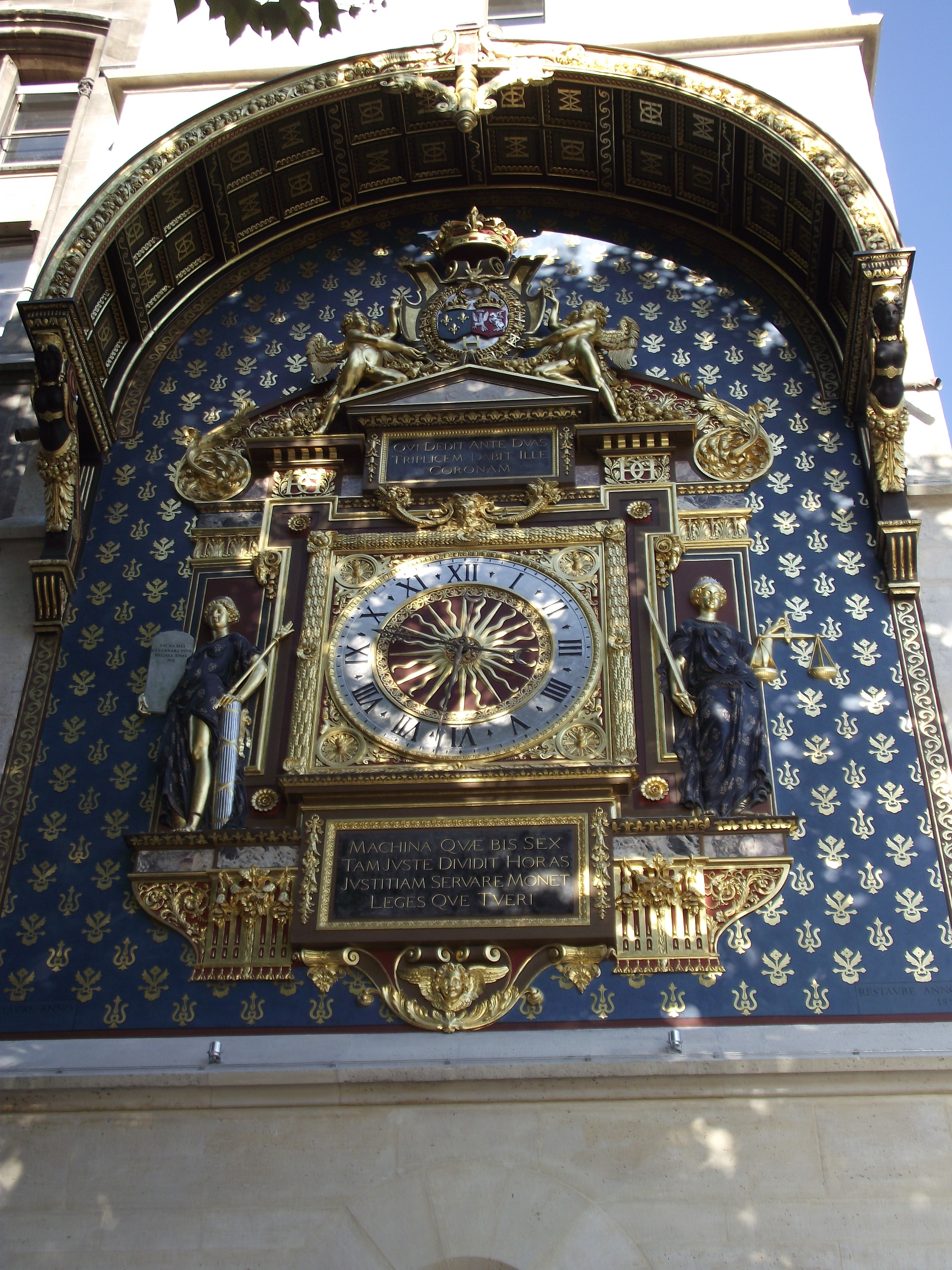 Parigi, Conciergerie, Orologio del 1370 con decori del 1585